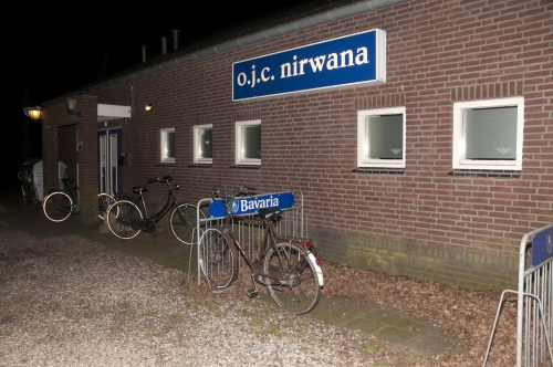 OJC Nirwana buiten